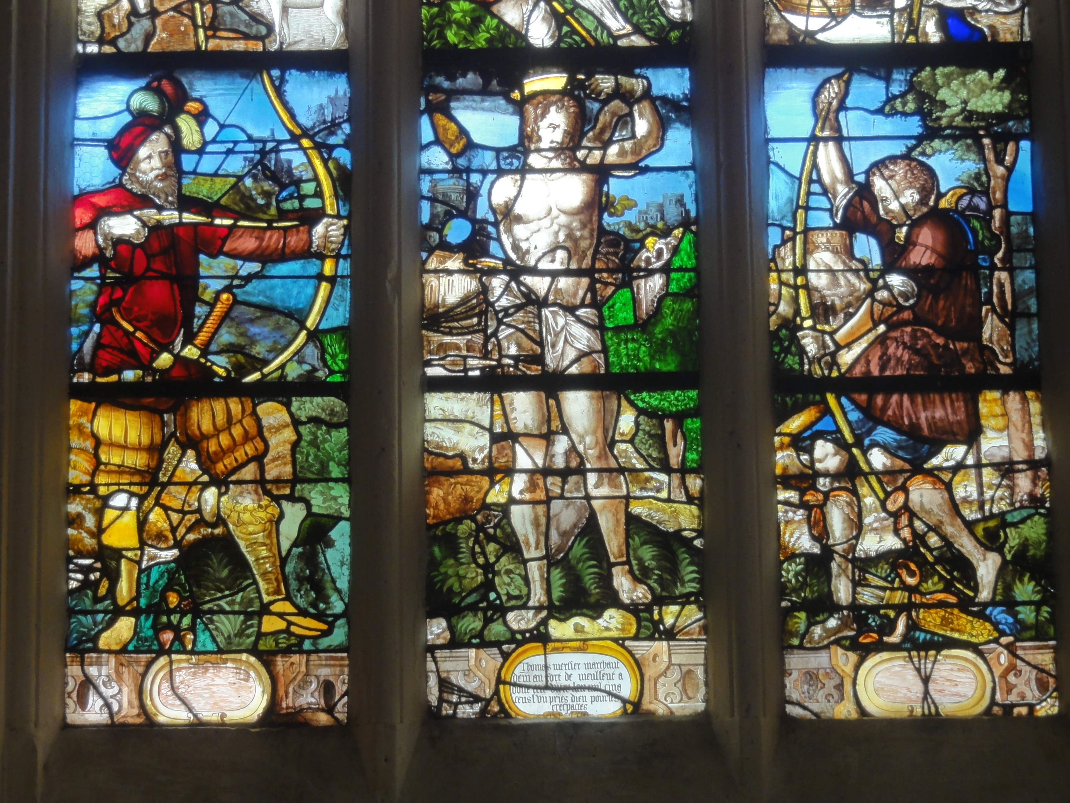 Verrière n° 7.